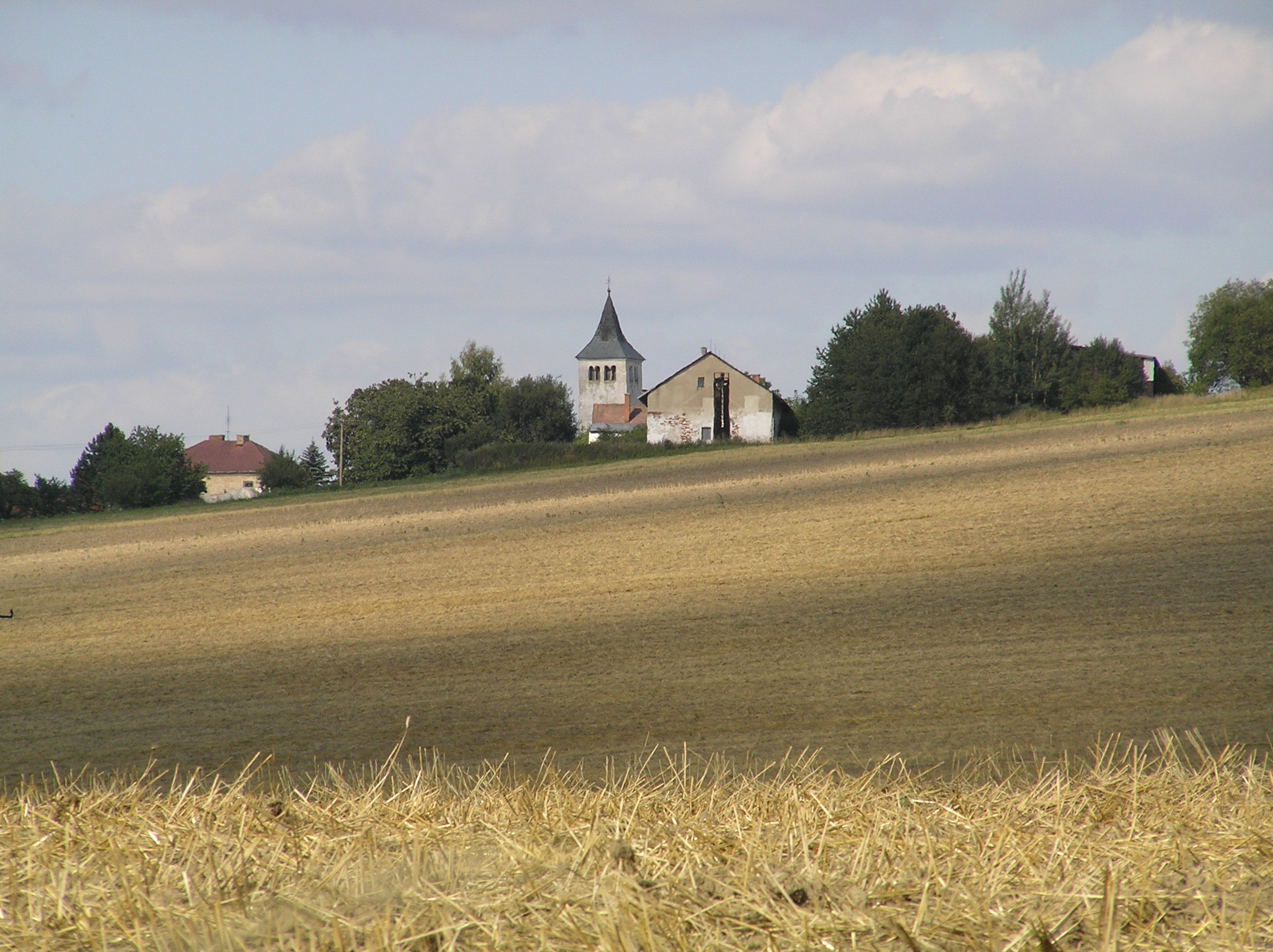 Kostel svatého Prokopa s areálem, Pohnání.